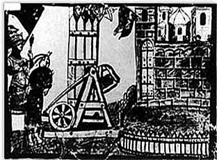 Assedio di Carlo d'Angiò a Poggiobonizio (Cronaca del Villani - Biblioteca Vaticana)